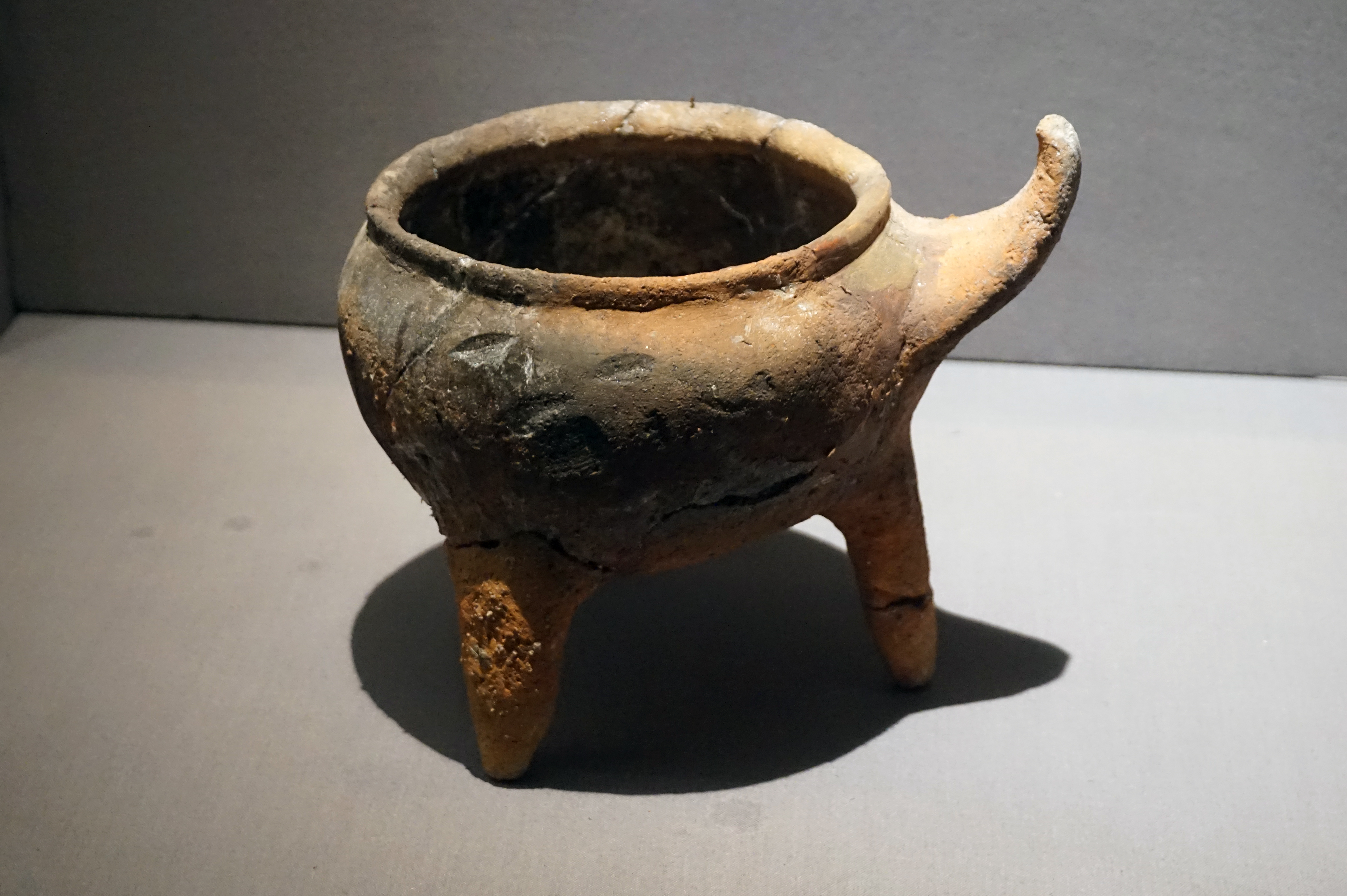 湖熟文化陶鼎。南京铁心桥郭家山坑出土。